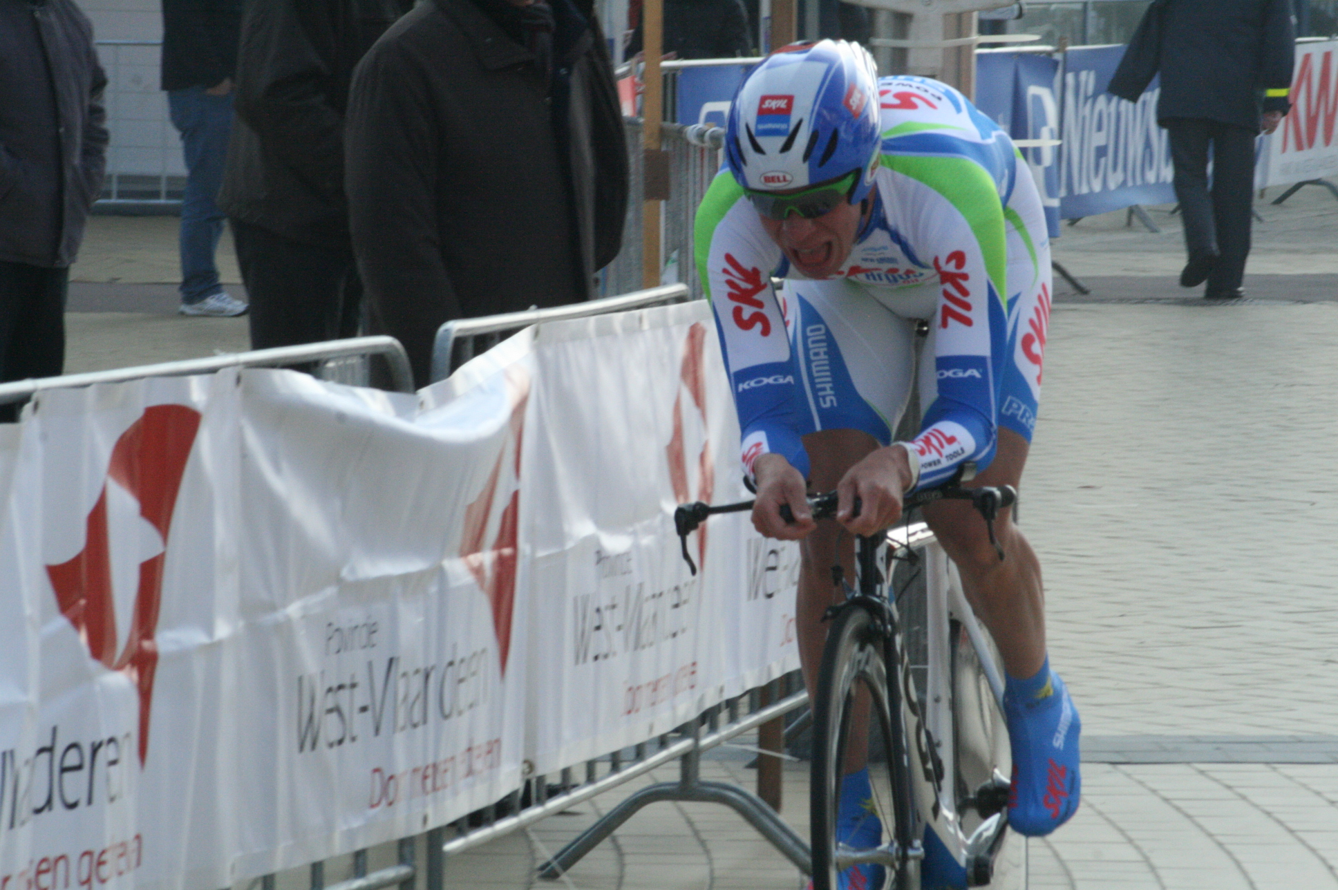 Driedaagse van West-Vlaanderen 2011, proloog in Middelkerke